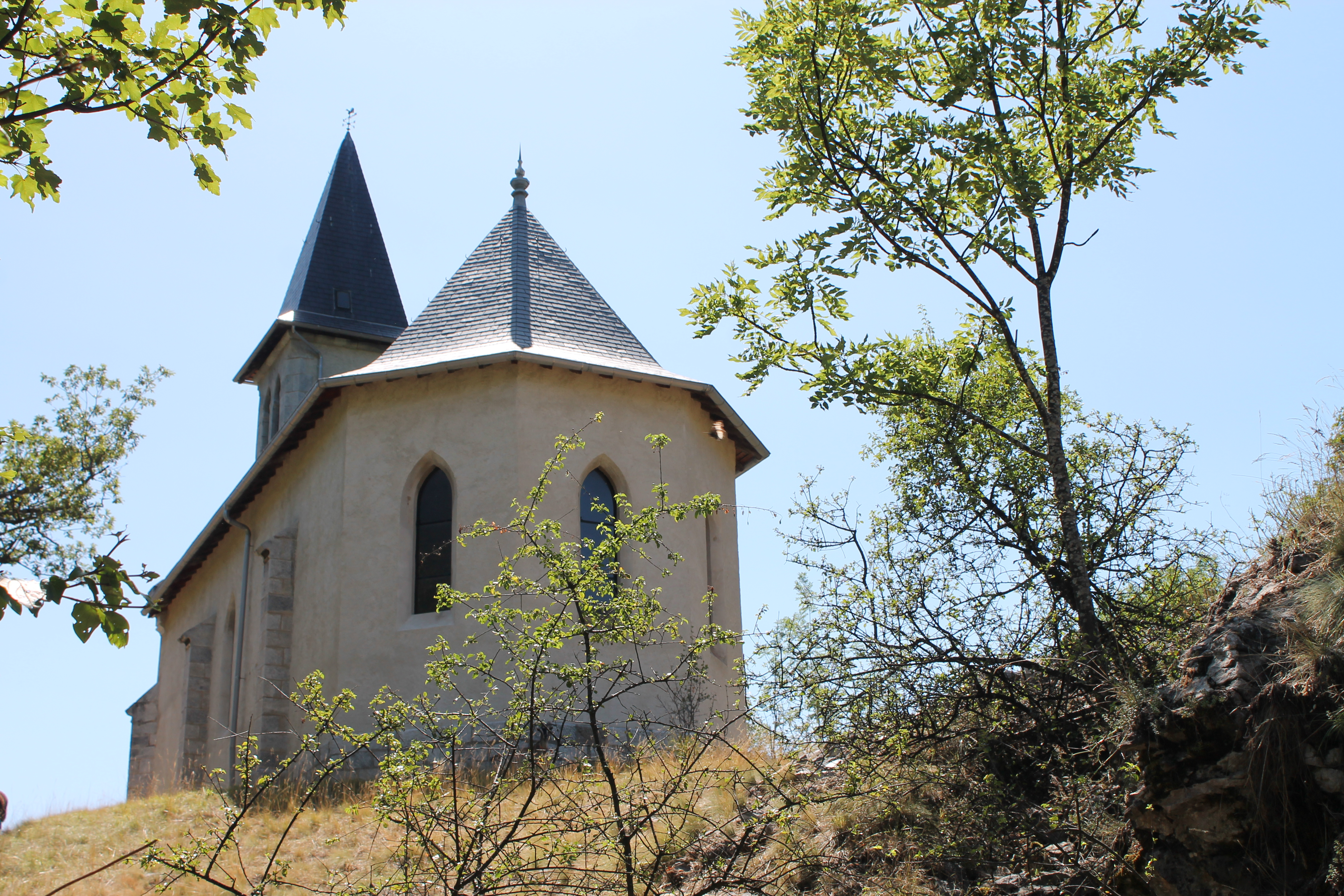 Chapelle Saint-Jacques de Saint-Marcel (2019).